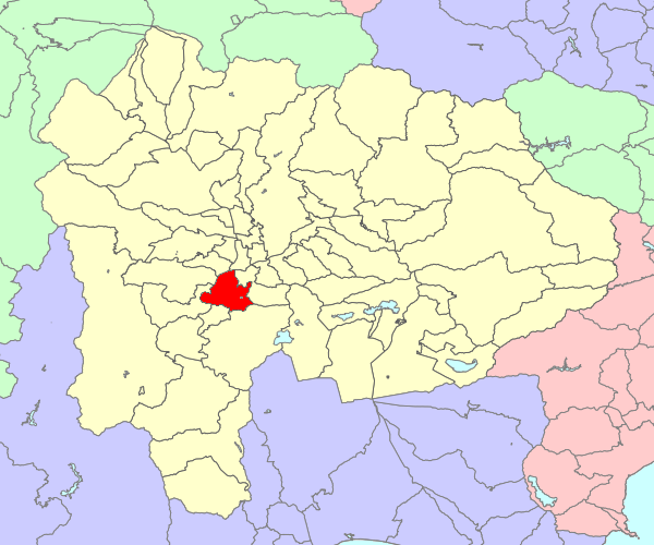 山梨県西八代郡市川大門町の位置画像。